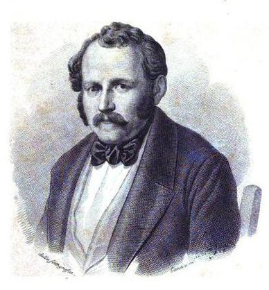 Ritratto di Aurelio Bianchi-Giovini